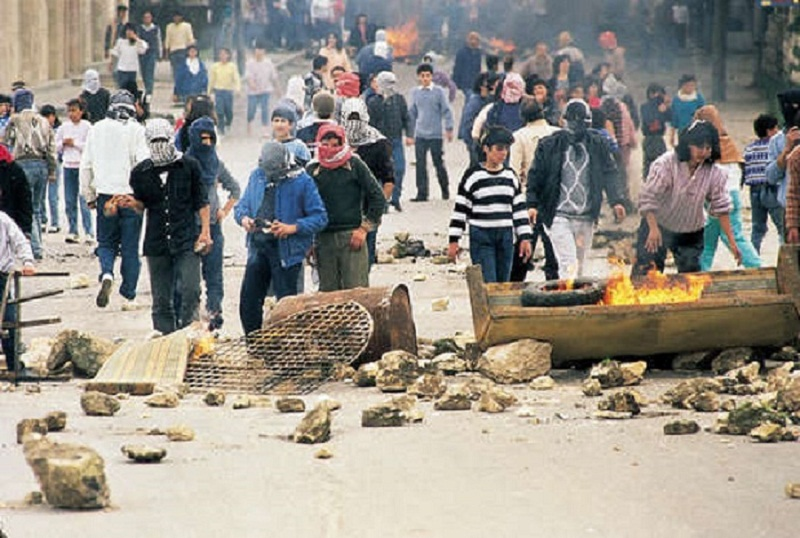 Arton8011